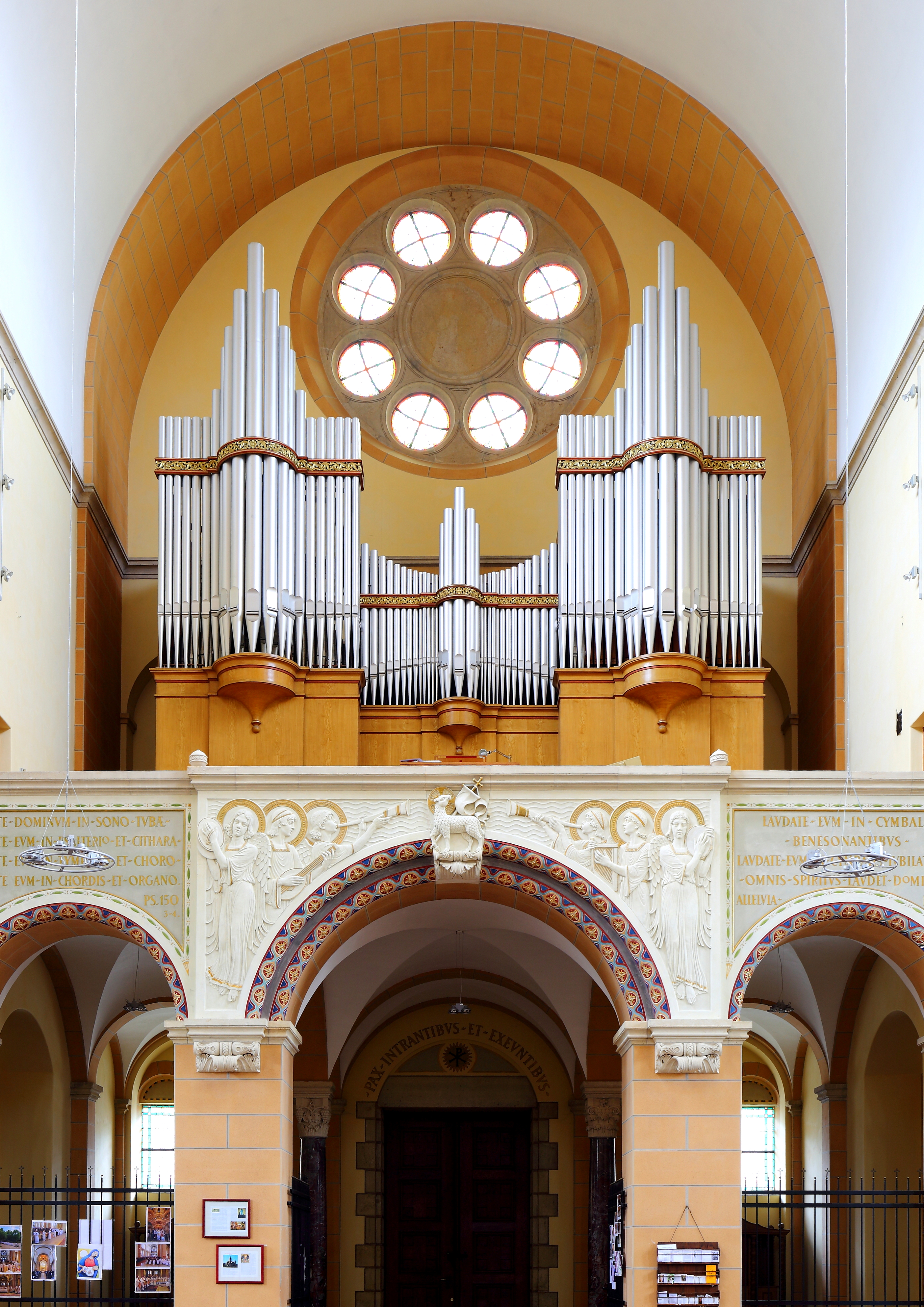 Orgel der Franz-von-Assisi-Kirche, auch Mexikokirche bezeichnet, im 2. Wiener Gemeindebezirk Leopoldstadt.Die Orgel mit 56 Register auf drei Manualen und Pedal wurde von der Orgelbaufirma Gebrüder Rieger gefertigt und am 7. Juli 1940 von Kardinal Erzbischof Dr. Theodor Innitzer geweiht.